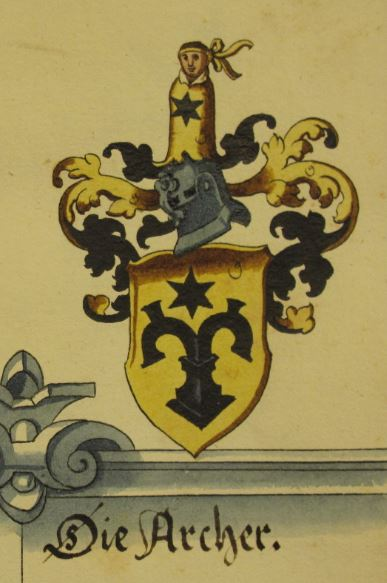 Staatsarchiv Bern, DQ 891, fol. 54r (Detail)